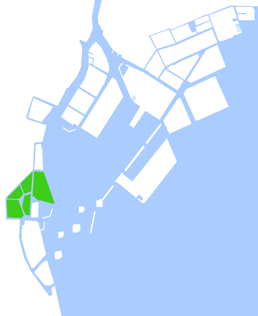 1911年～1920年に行われた第2期の隅田川口改良工事の対象地域